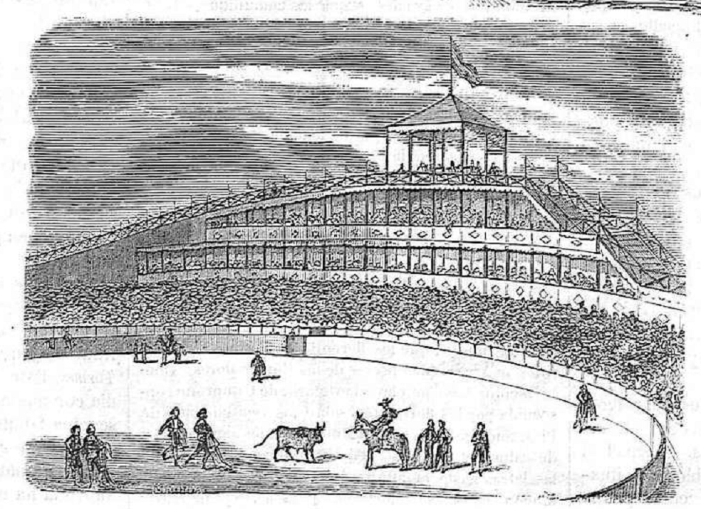 Los Campos Elíseos de Madrid, en la publicación española El Periódico Ilustrado.